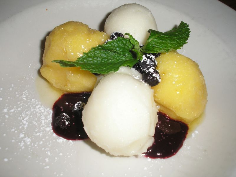 Sorbets